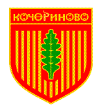 Герб на Кочериново